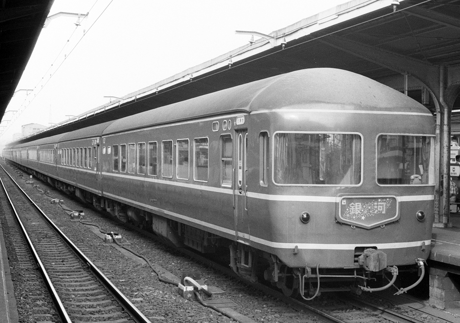 国鉄 20系客車 急行 銀河